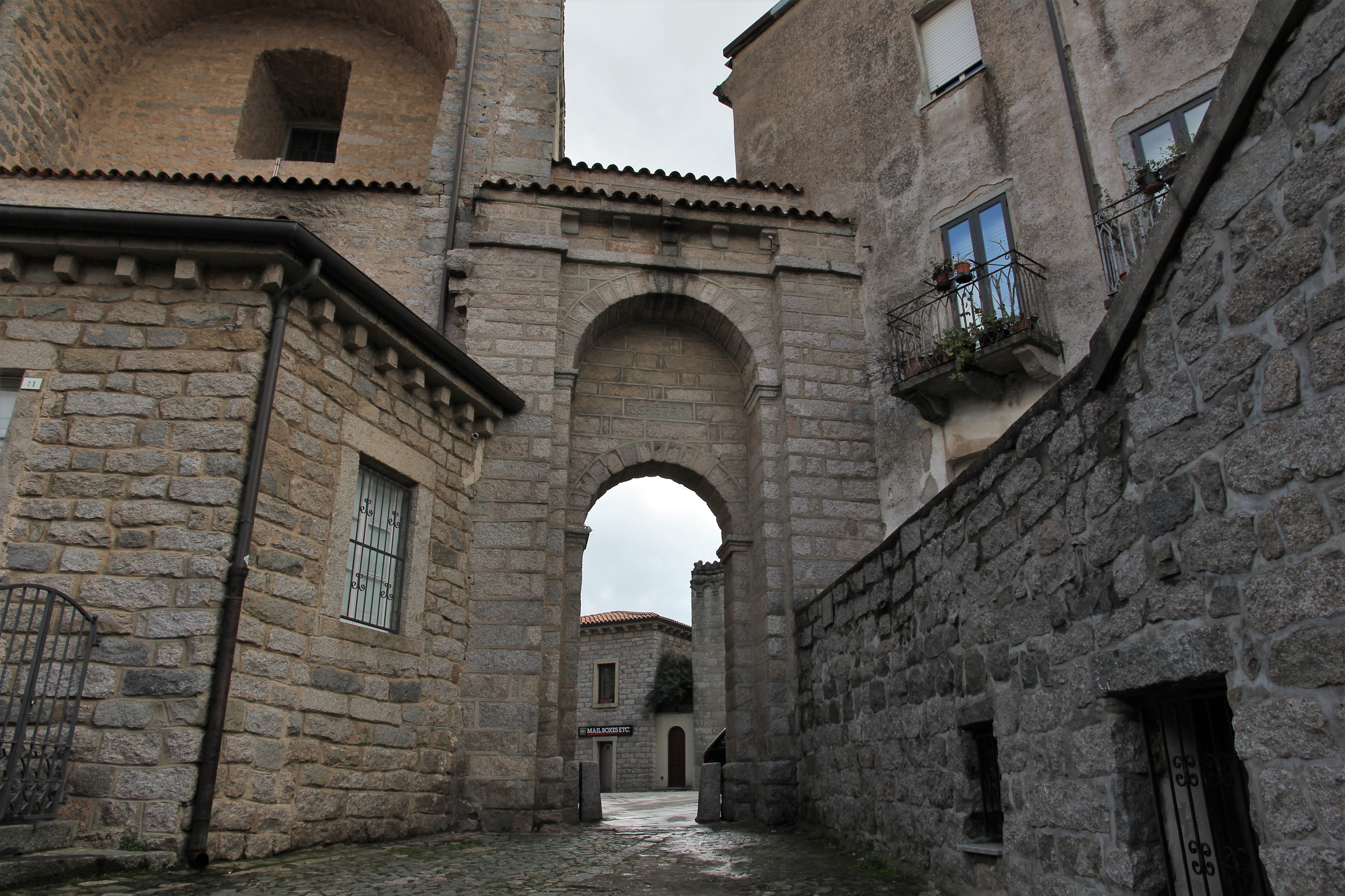 Tempio Pausania